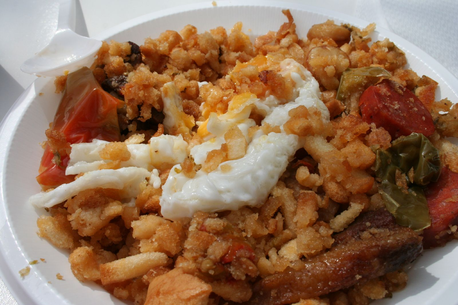 Un plato de migas con huevo